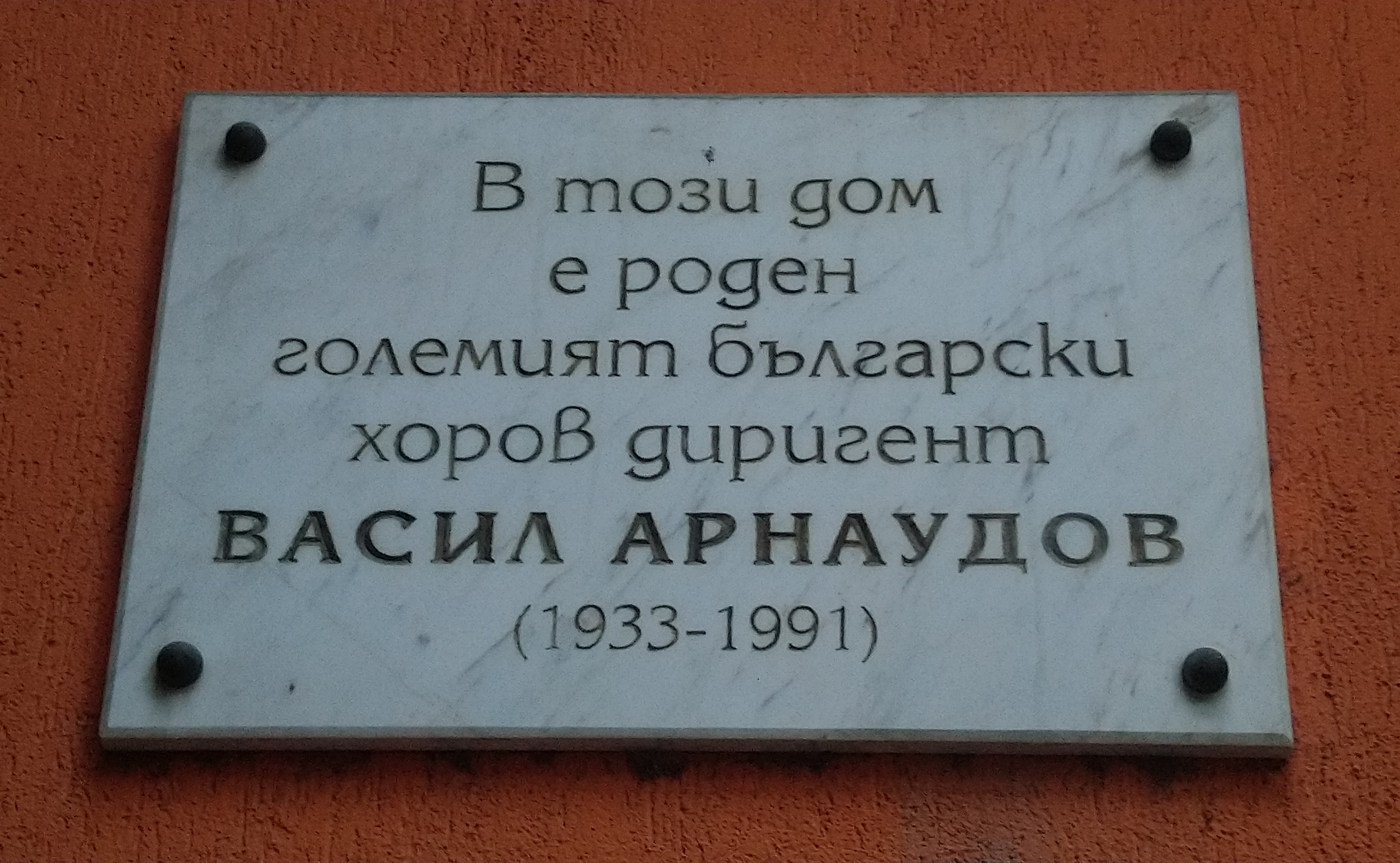 Паметна плоча на хоровия диригент Васил Арнаудов, ул. "27 юли", 36, Варна